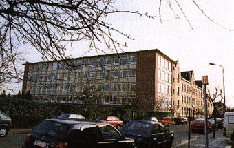 Institut Don Bosco aujourd'hui